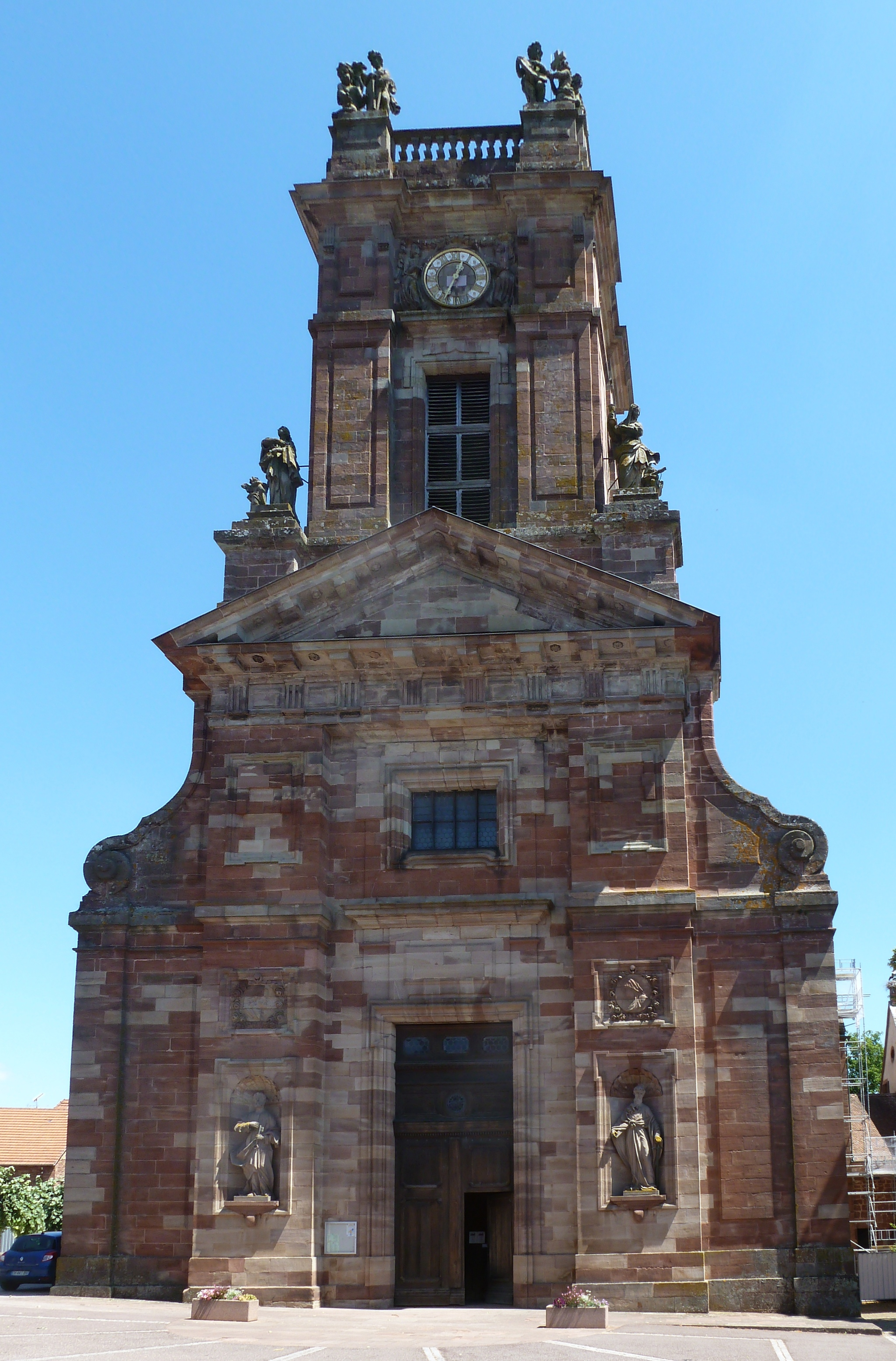 Façade néo-classique de l'abbatiale Sts-Pierre-et-Paul à Neuwiller-lès-Saverne (Bas-Rhin, Alsace, France). This building is indexed in the Base Mérimée, a database of architectural heritage maintained by the French Ministry of Culture, under the references PA00084820 and IA67009917 .